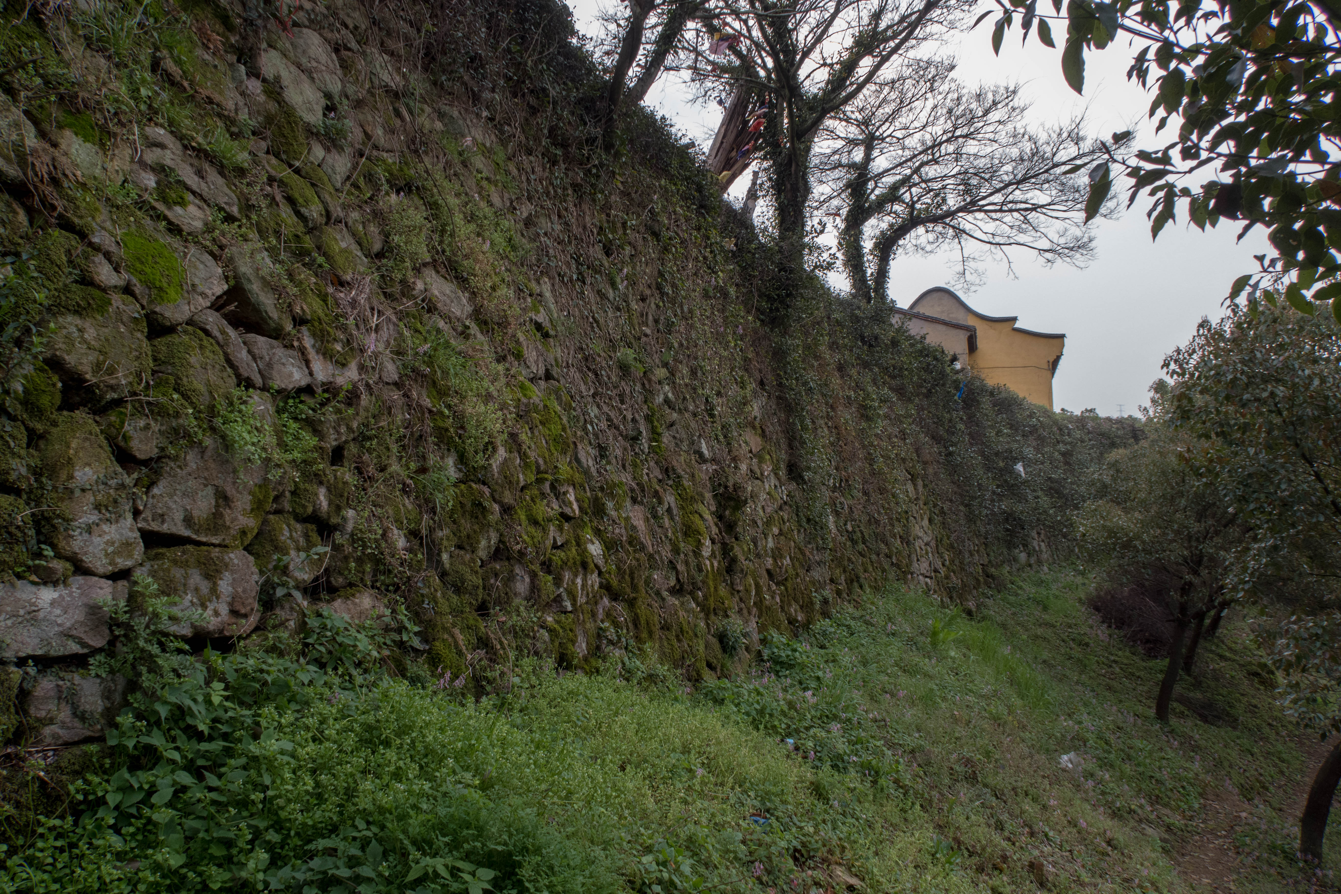 大嵩城遗址